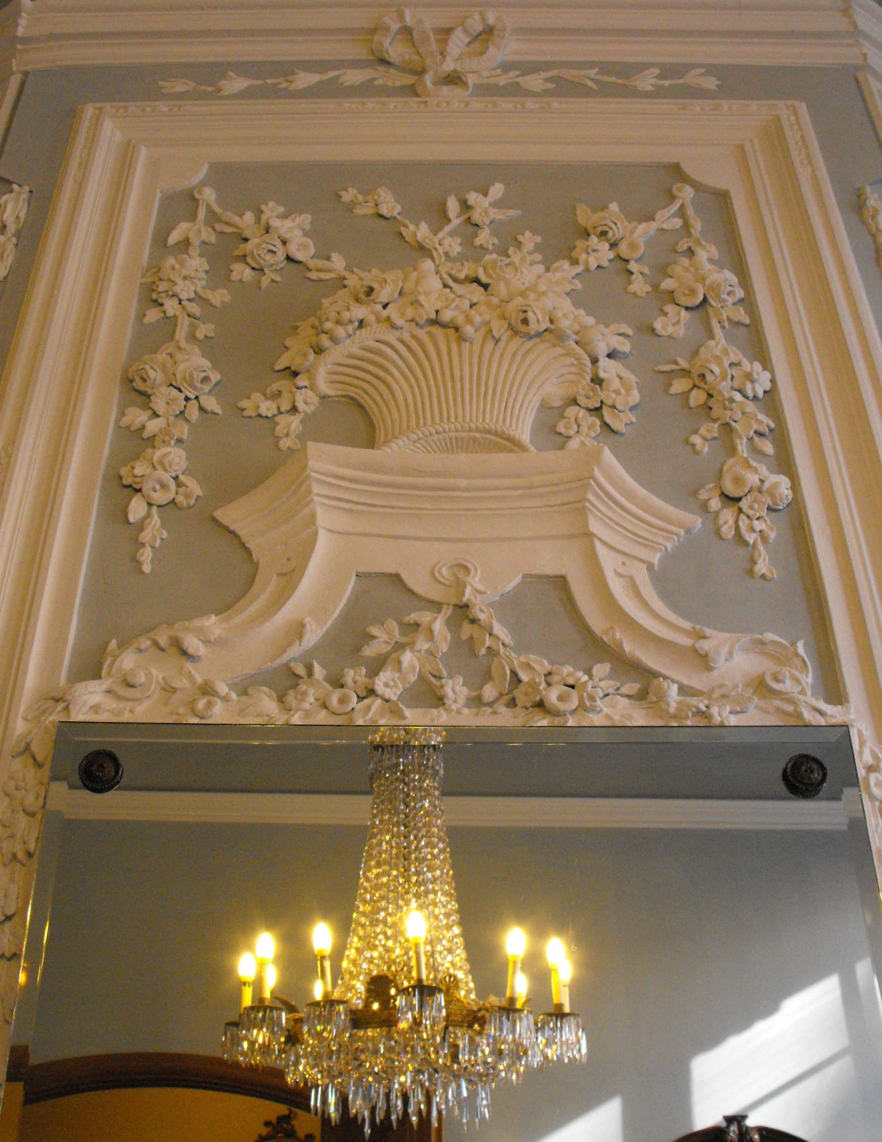 Couven-Museum: Kaminzimmer (Detail): Gagini -Stuck